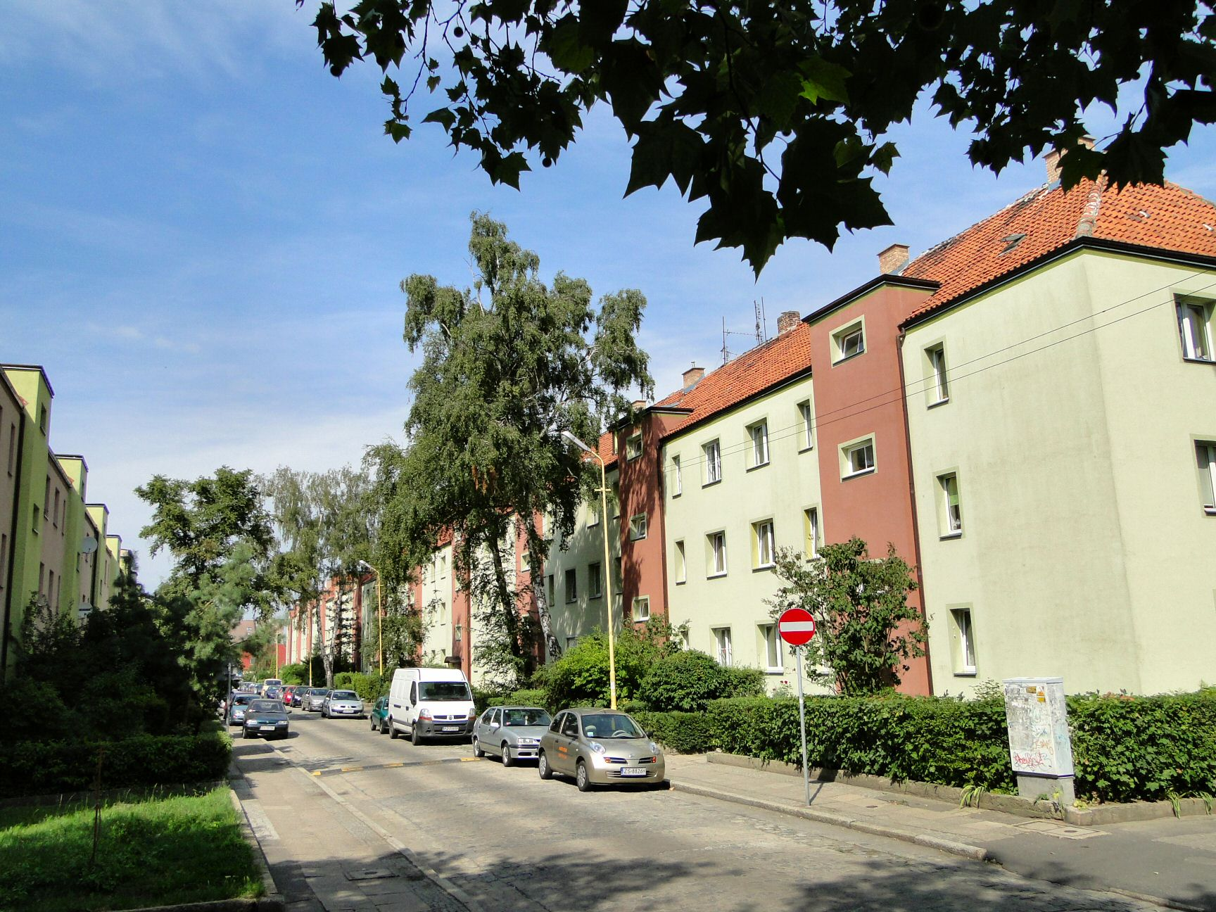 Szczecin ul. Jana Styki